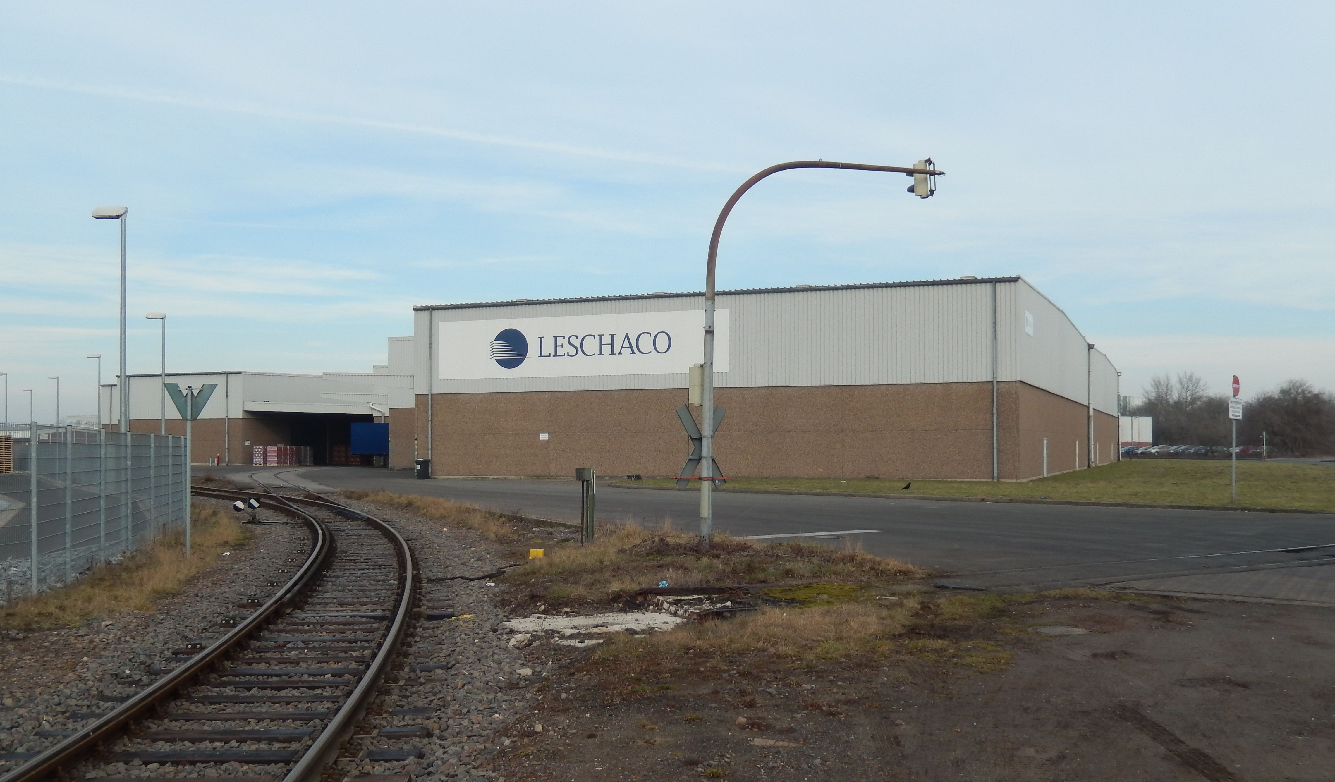 Lagerhalle Leschaco in Minden-Industriehafen